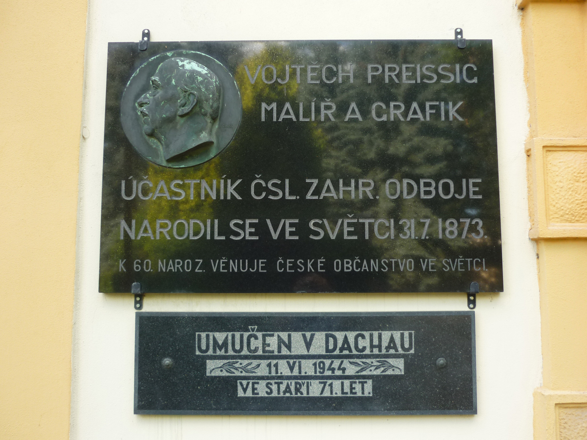 Tafel zur Erinnerung an den Maler Vojtěch Preissig am Schloss Schwaz / Světec in Böhmen